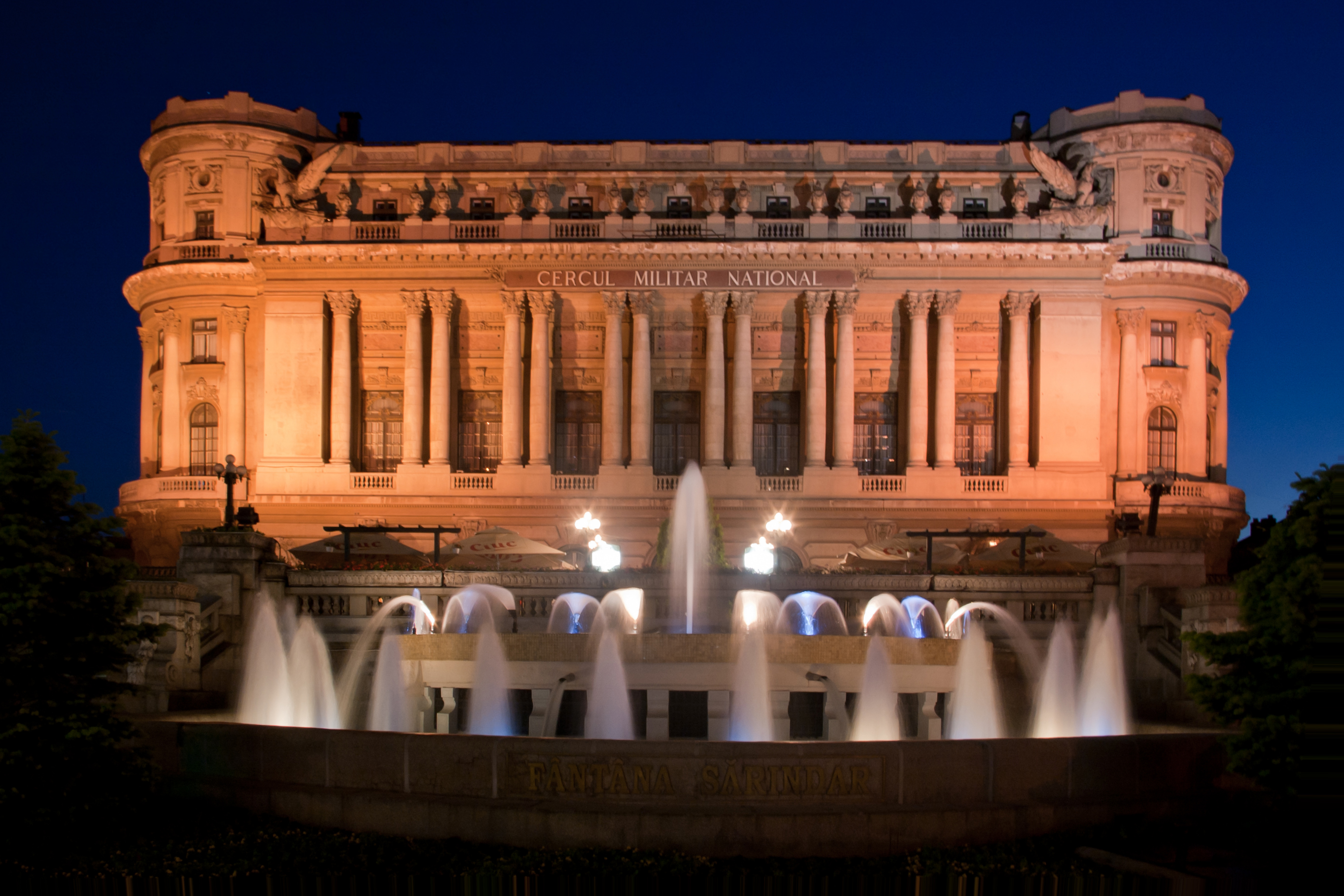 Fotografia prezinta cladirea Cercului Militar Național in ora albastra (amurg)